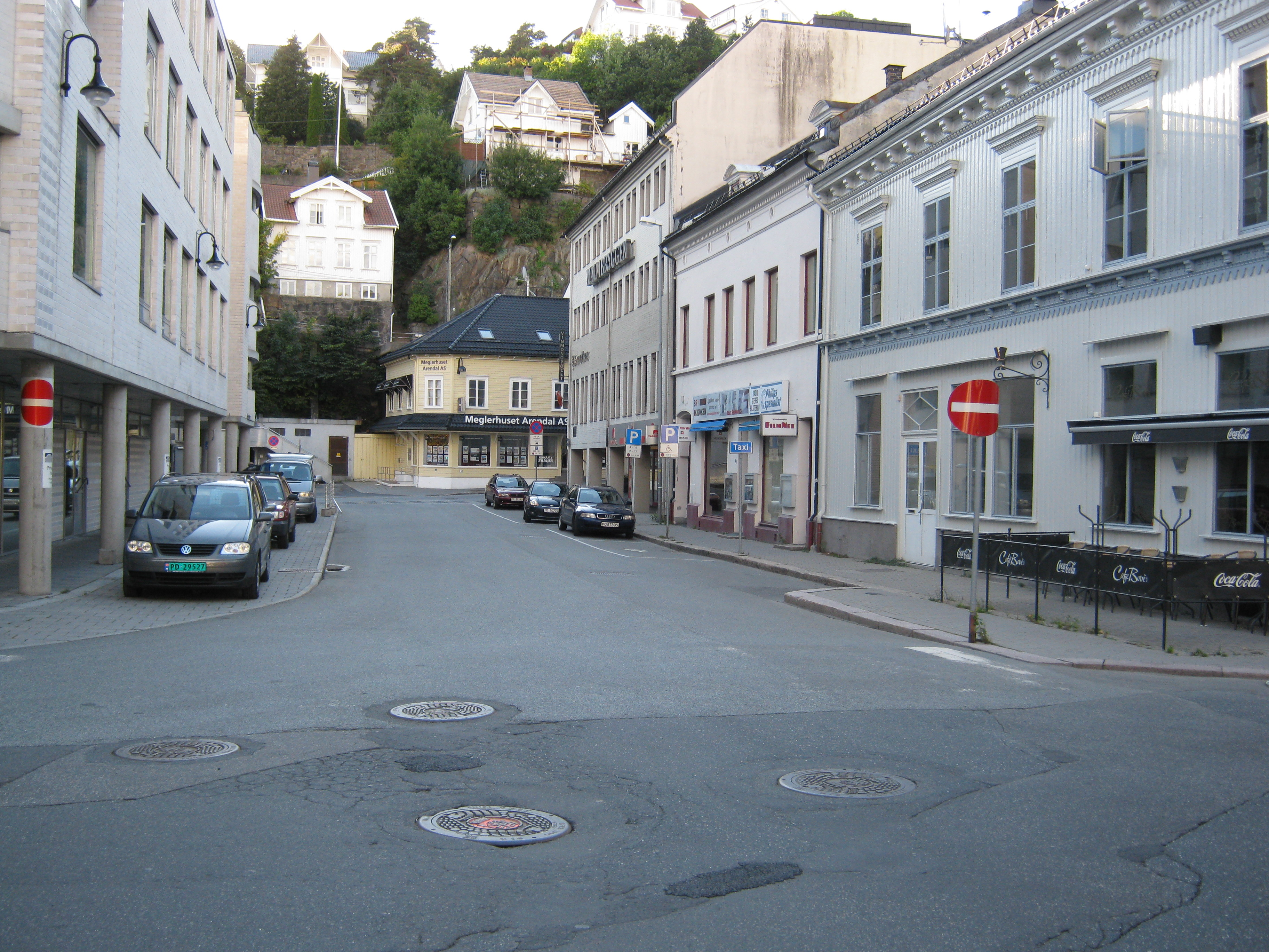 Malmbryggen i Arendal, tatt fra Strandgaten